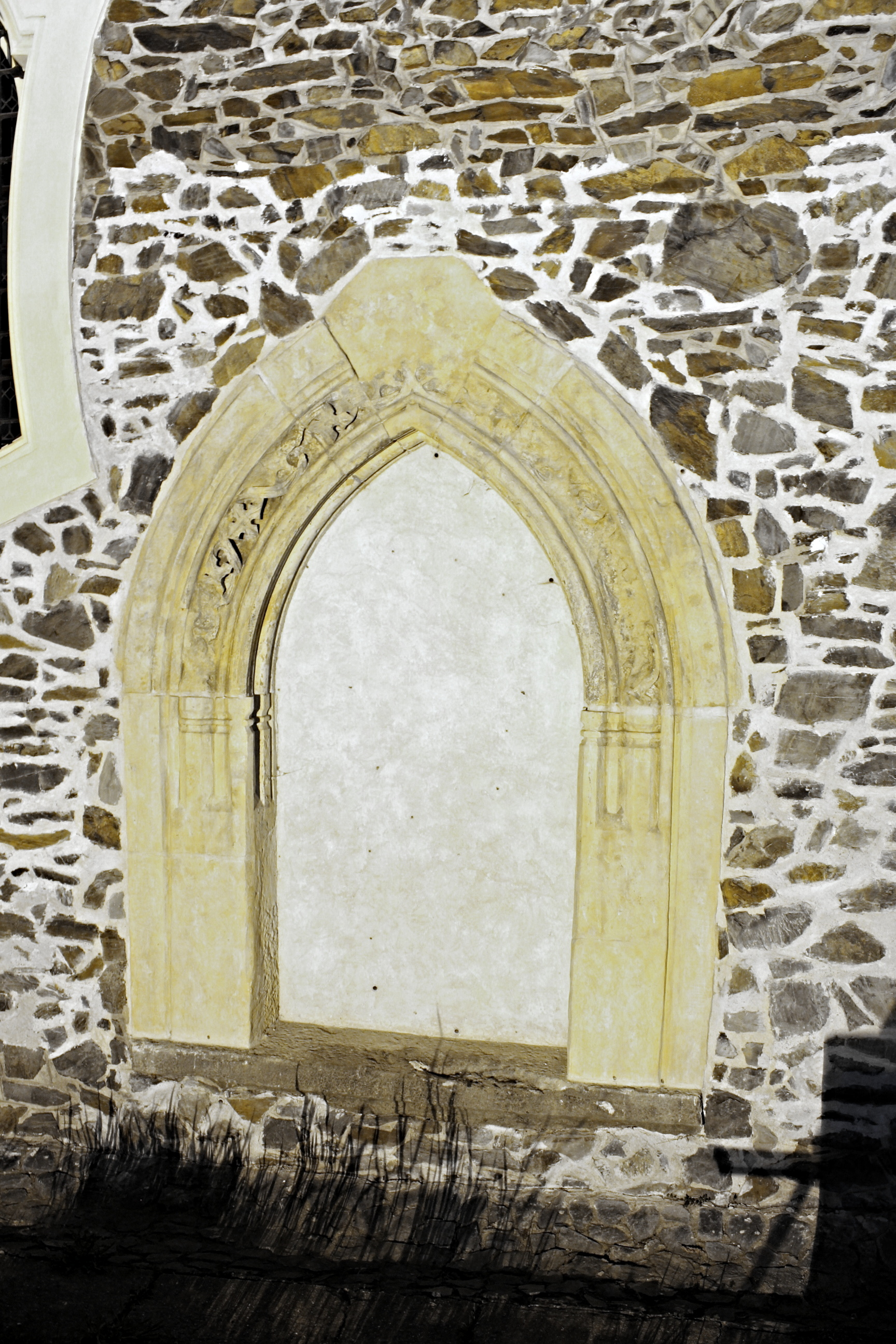 Praha-Petrovice, kostel sv. Jakuba Většího